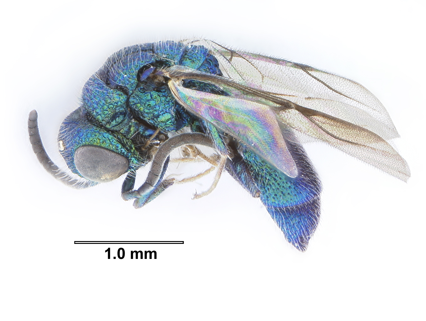 Cuckoo wasp